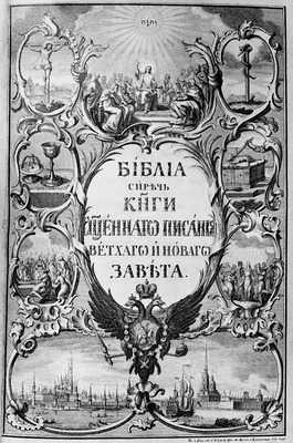 Елизаветинская Библия